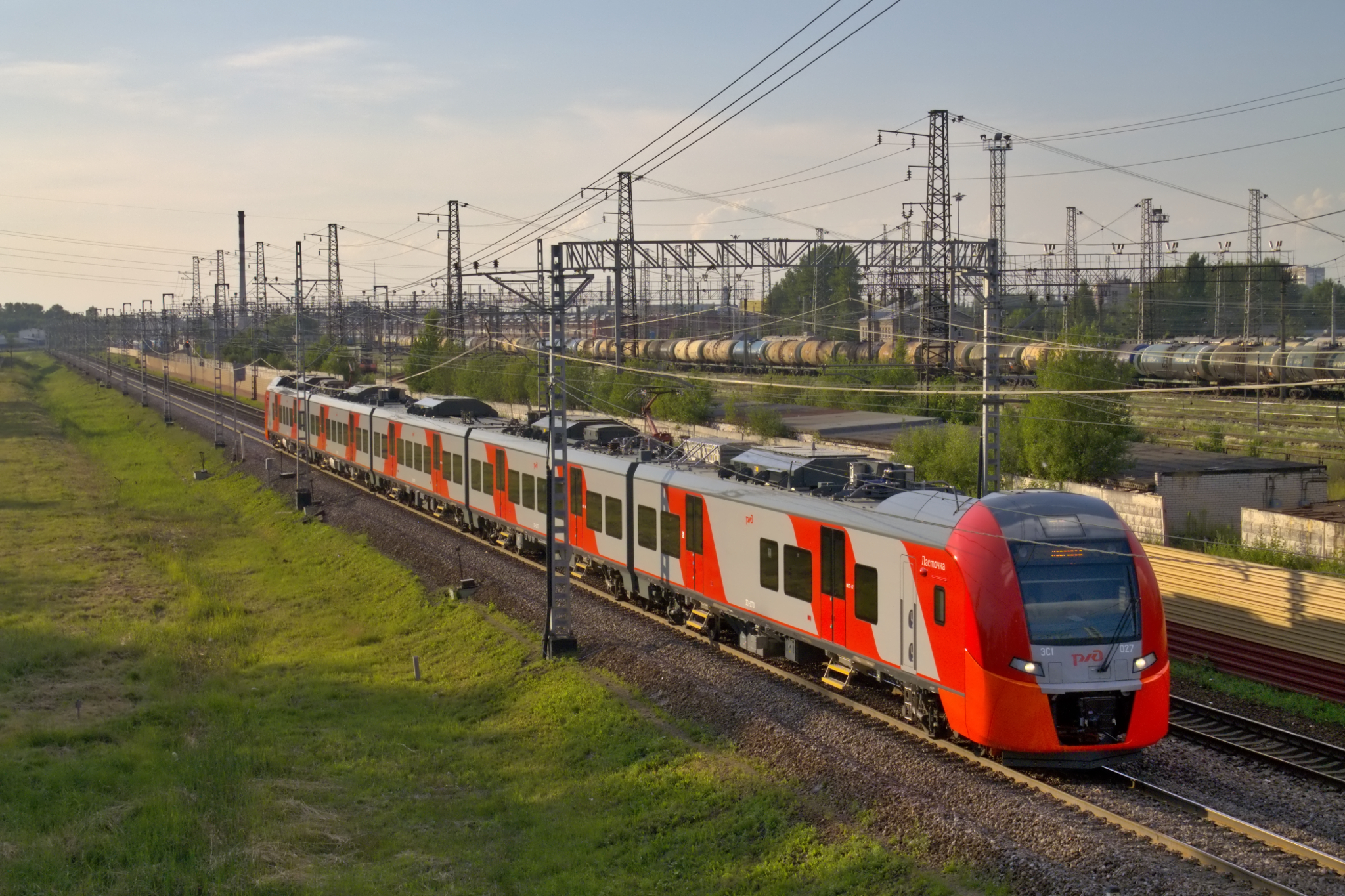 ЭС1-027, Санкт-Петербург - Великий Новгород, Фарфоровская. см. фото 516811 в альбоме автора